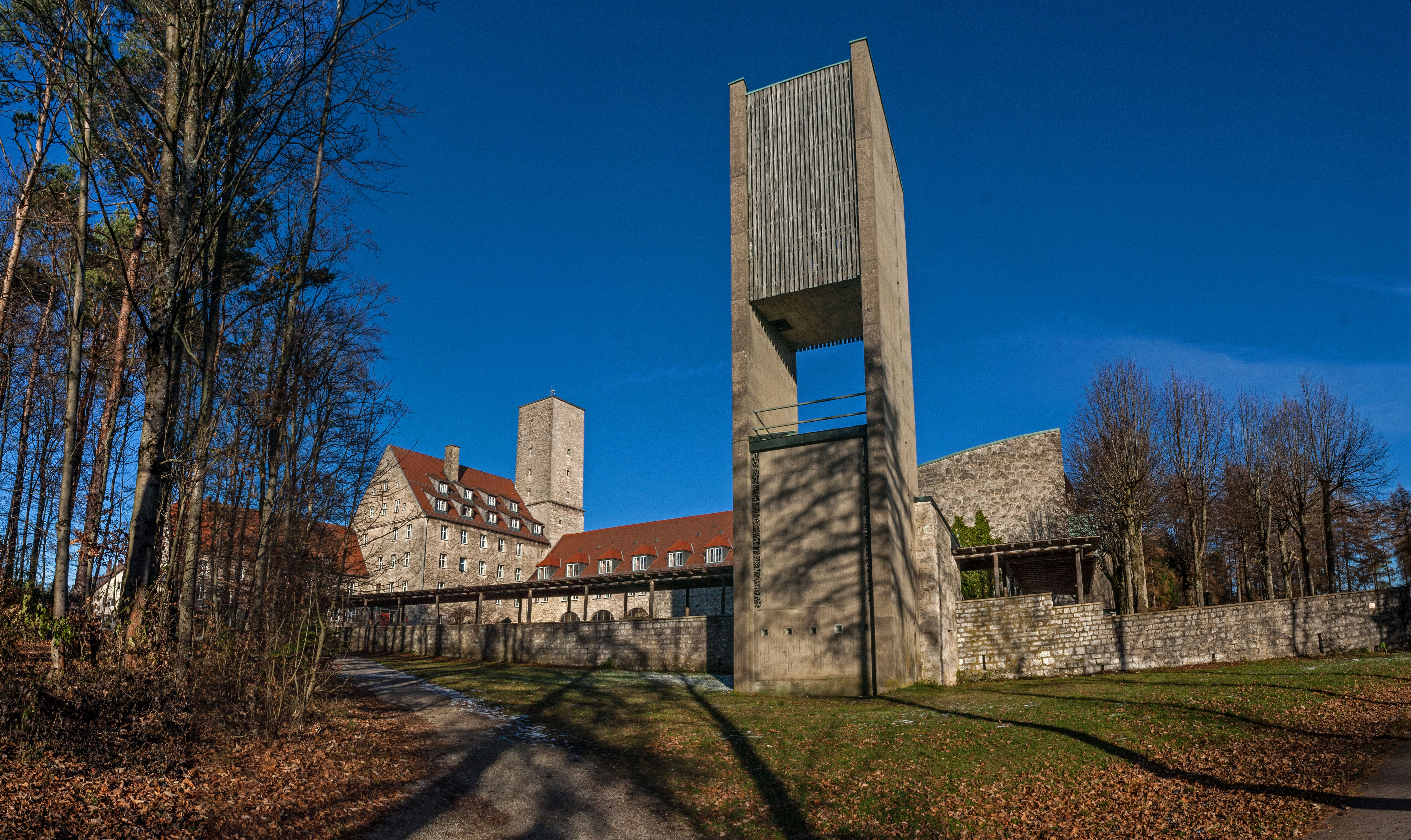 Burg Feuerstein, Panorama, Aussen